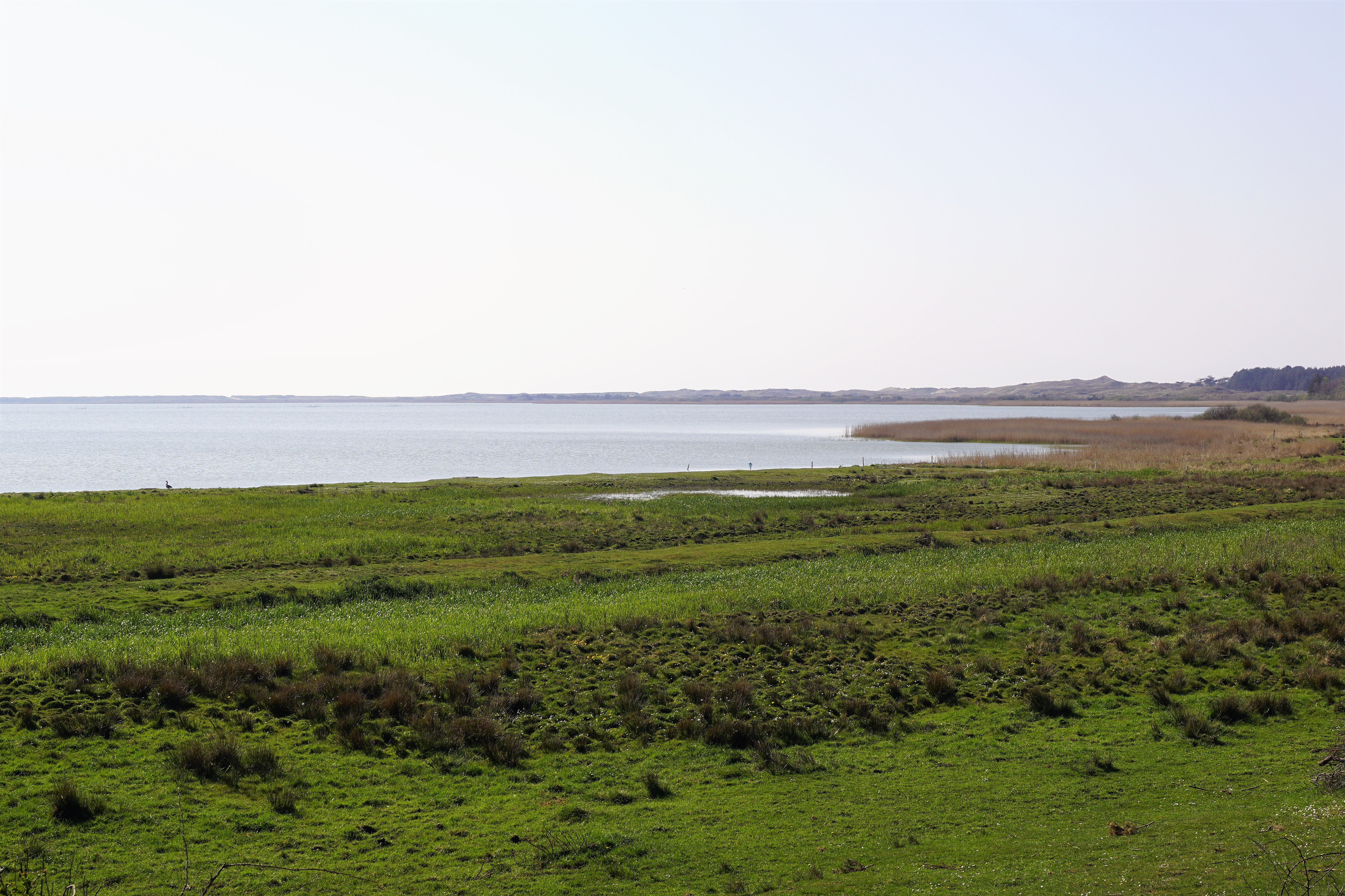 Flade Sø nord for Agger